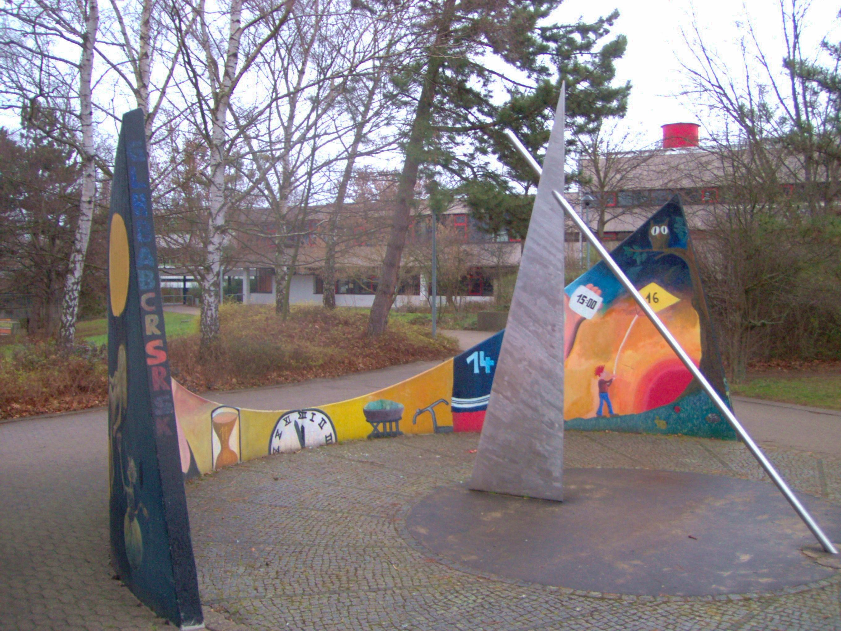 Quenstedt-Gymnasium Mössingen, Portal mit Sonnenuhr.